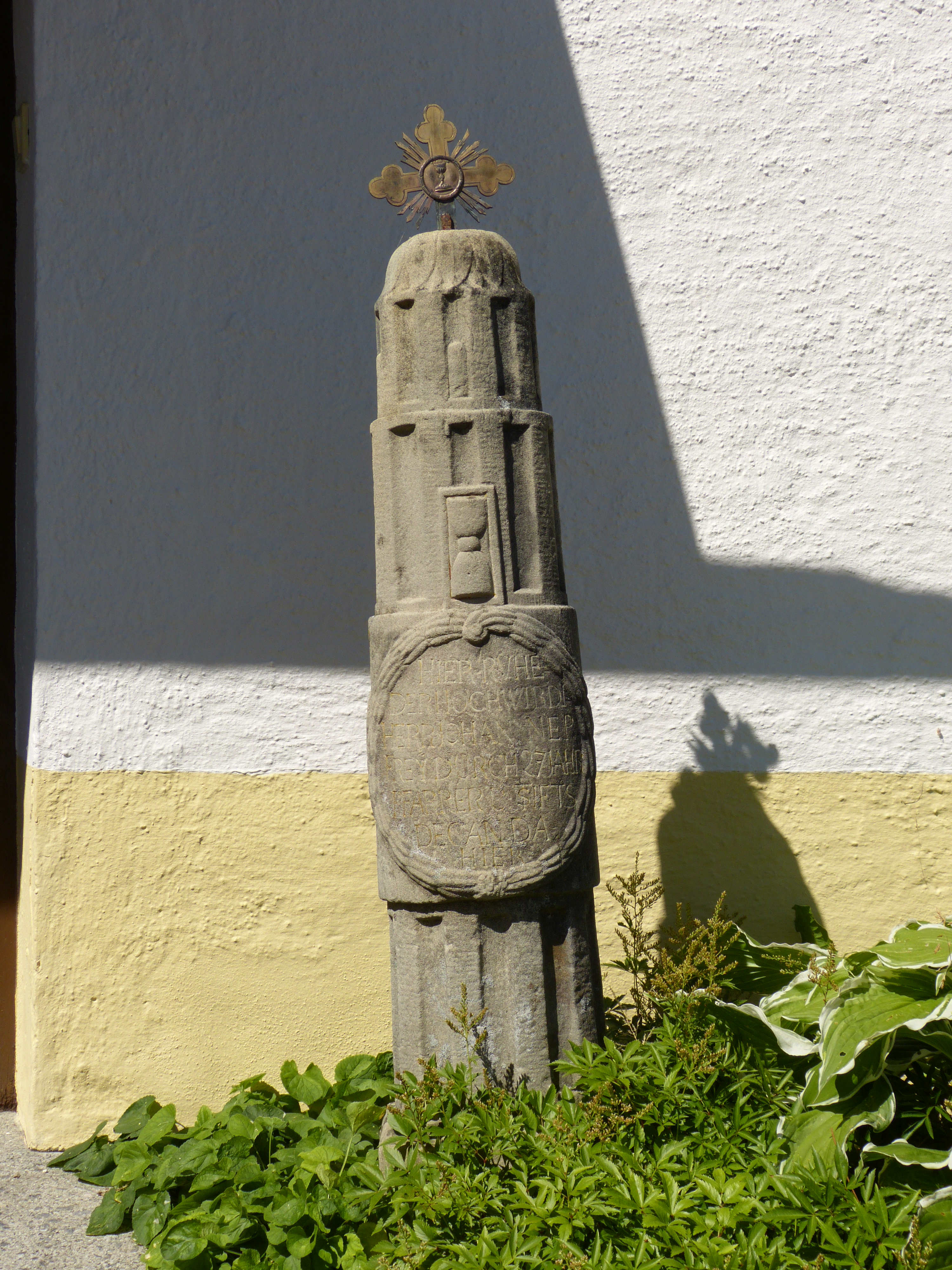 Epitaph in der Stiftskirche St. Philip und Jakob in Bad Grönenbach, Landkreis Unterallgäu, Bayern